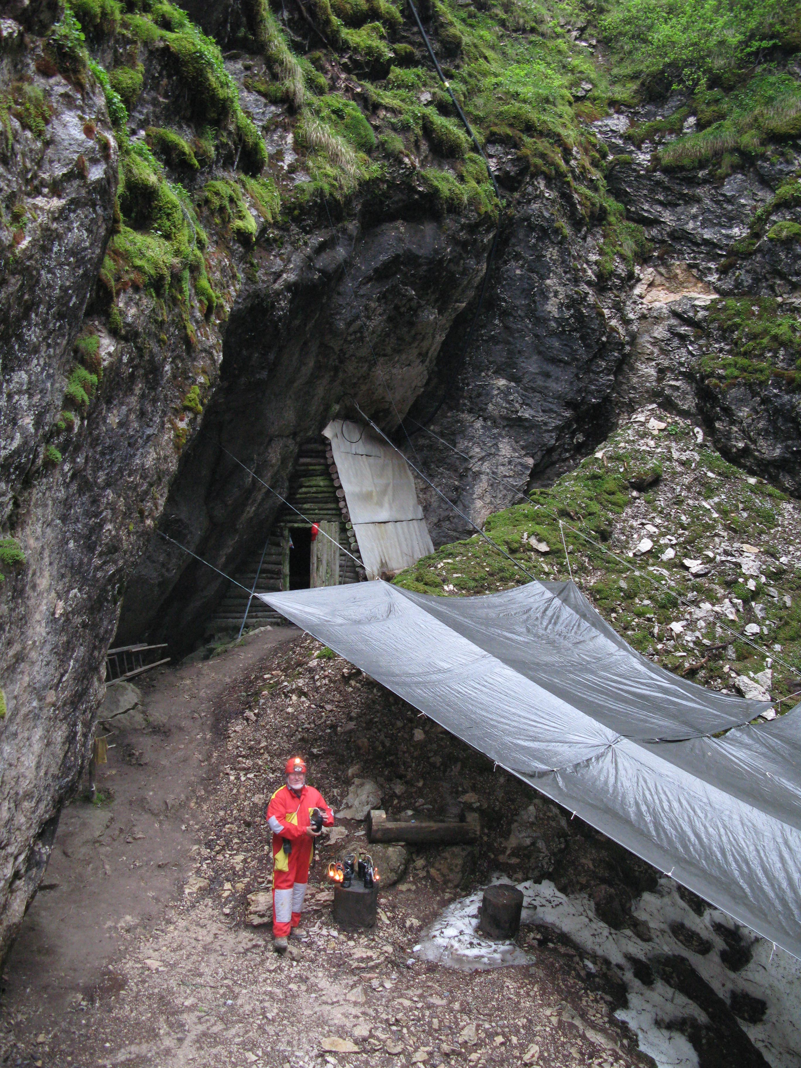 Vhodna udornica v Snežno jamo